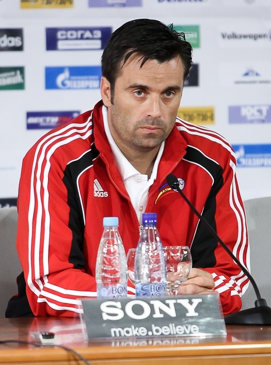 Кольдо — тренер национальной сборной Андорры.